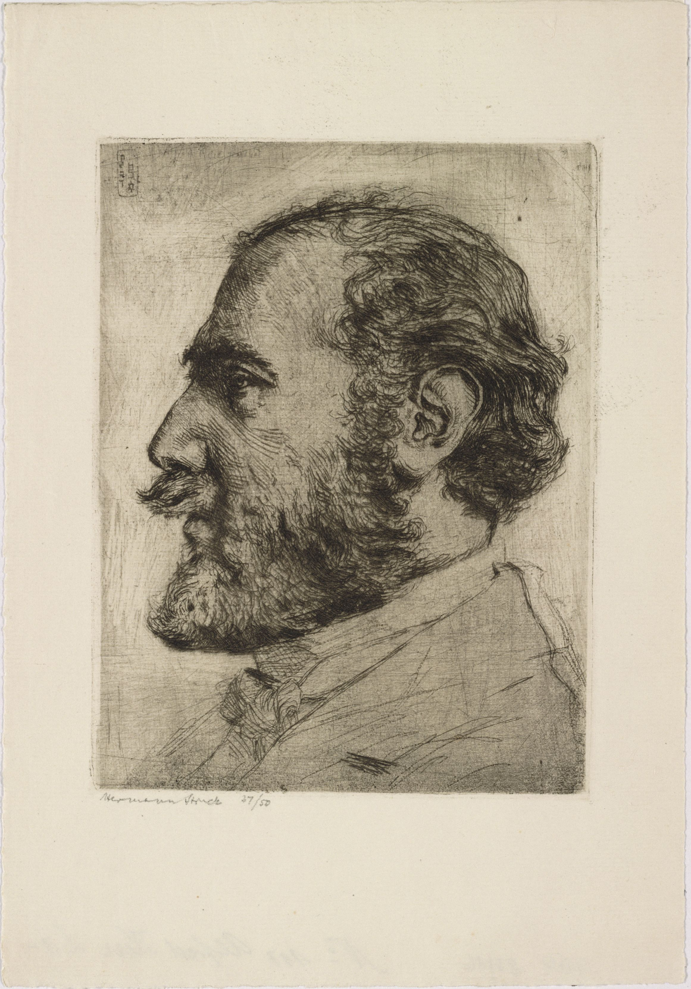 Artwork by Hermann Struck Dargestellte Person: Kerr, Alfred (25.12.1867 - 12.10.1948), DNB-Link Datierung Display: ca. 1905 Objektart: Radierung Schlagworte Inhalt /Geografie: Mann, Porträt Schlagworte Kontext: Journalist, Schriftsteller